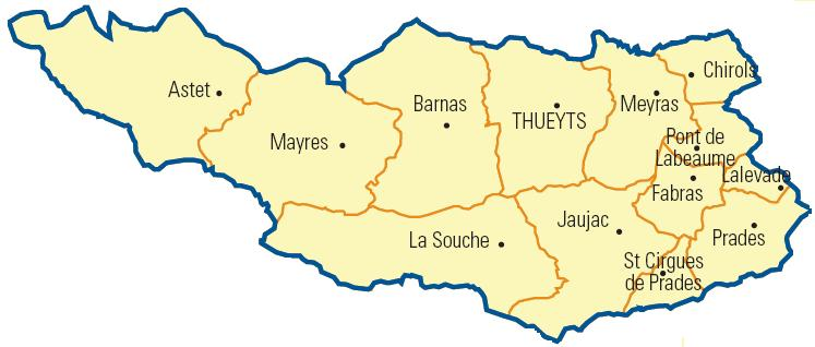 Carte détaillée des communes du canton (Ardèche)